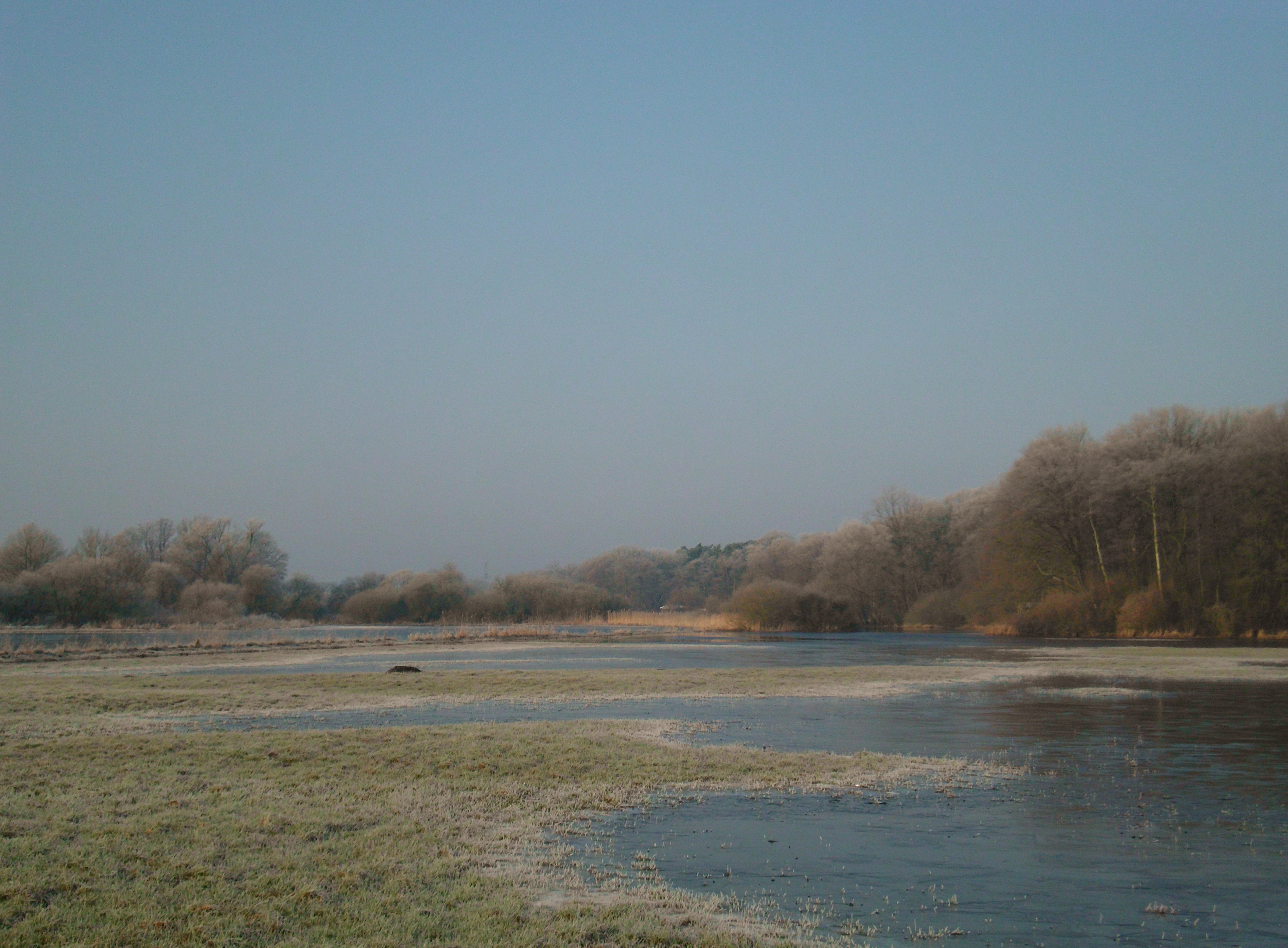 Wümmewiesen im frostigen Januar im FFH-Gebiet „Wümmeniederung“ im Landkreis Rotenburg (Wümme) (Niedersachsen, Deutschland) – Aufnahme in der Nähe des Naturschutzgebiets Fährhof (eventuell der Wald rechts im Bild?)